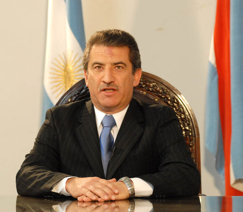 Foto oficial de Sergio Urribarri como Gobernador de Entre Ríos durante su primera administración (2007-2011)